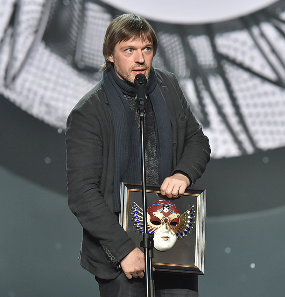 Премия Золотая маска - 2017 года